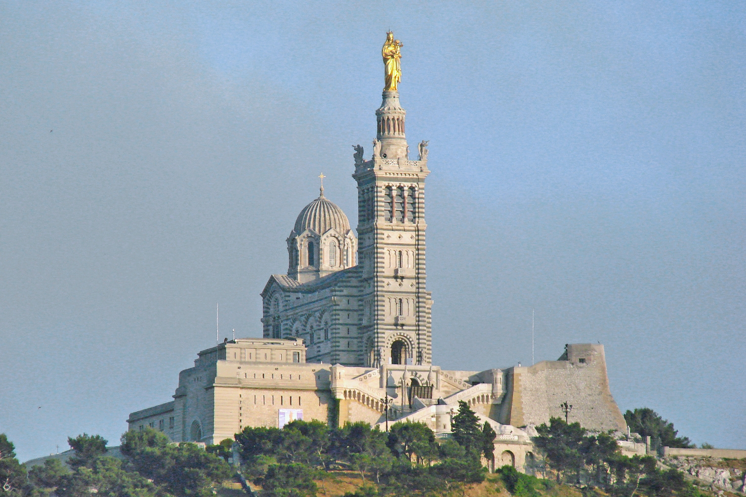 La basilique de Notre-Dame-de-la-Garde est de style romano-byzantin, elle a été conçue par l'architecte Espérandieu, les travaux de construction ont commencé en 1853. Photo Annie Dalbéra